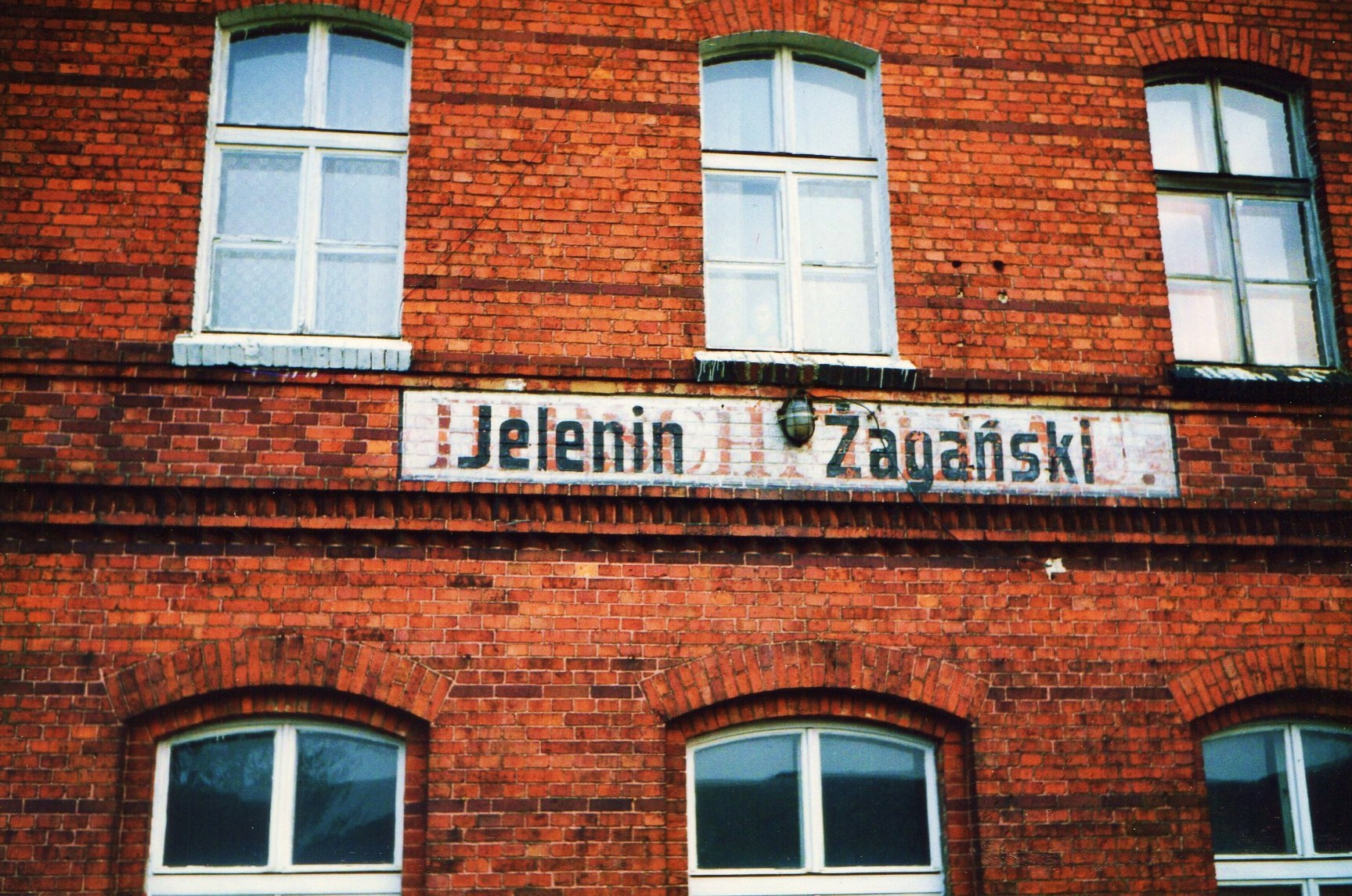 Stacja Jelenin Żagański.